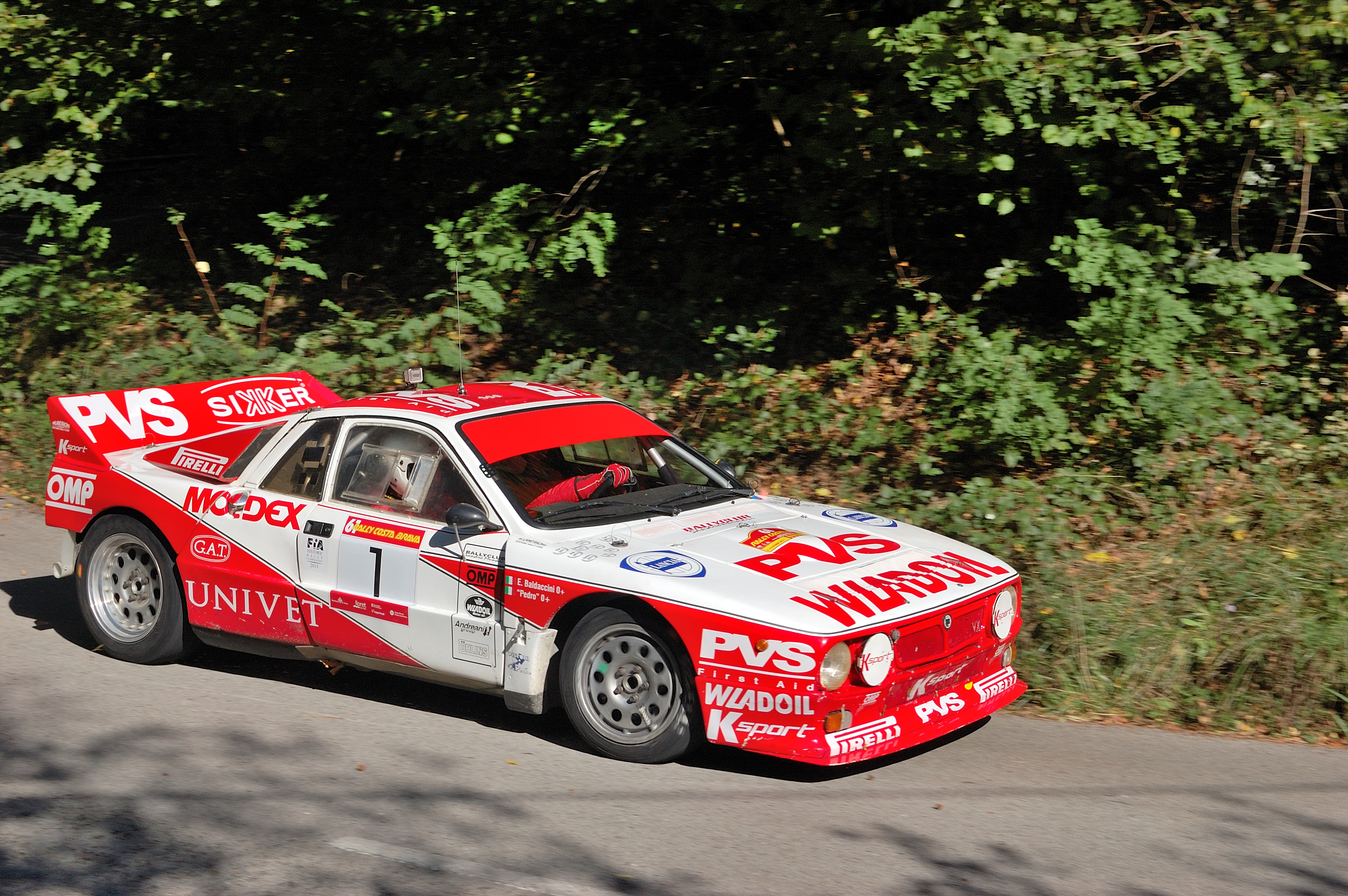 “Pedro”-Emanuele Baldaccini _ Lancia Rally 037 Rally Costa Brava 2013